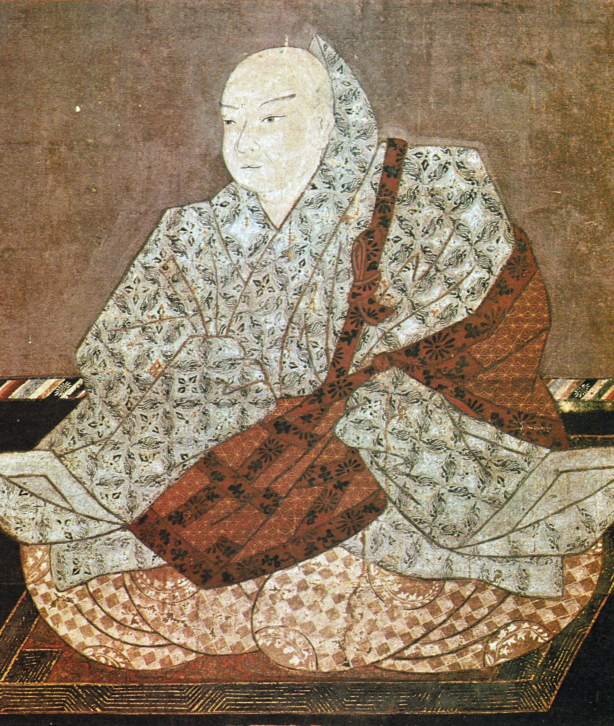 鳥羽法皇画像 安楽寿院所蔵 作者不詳